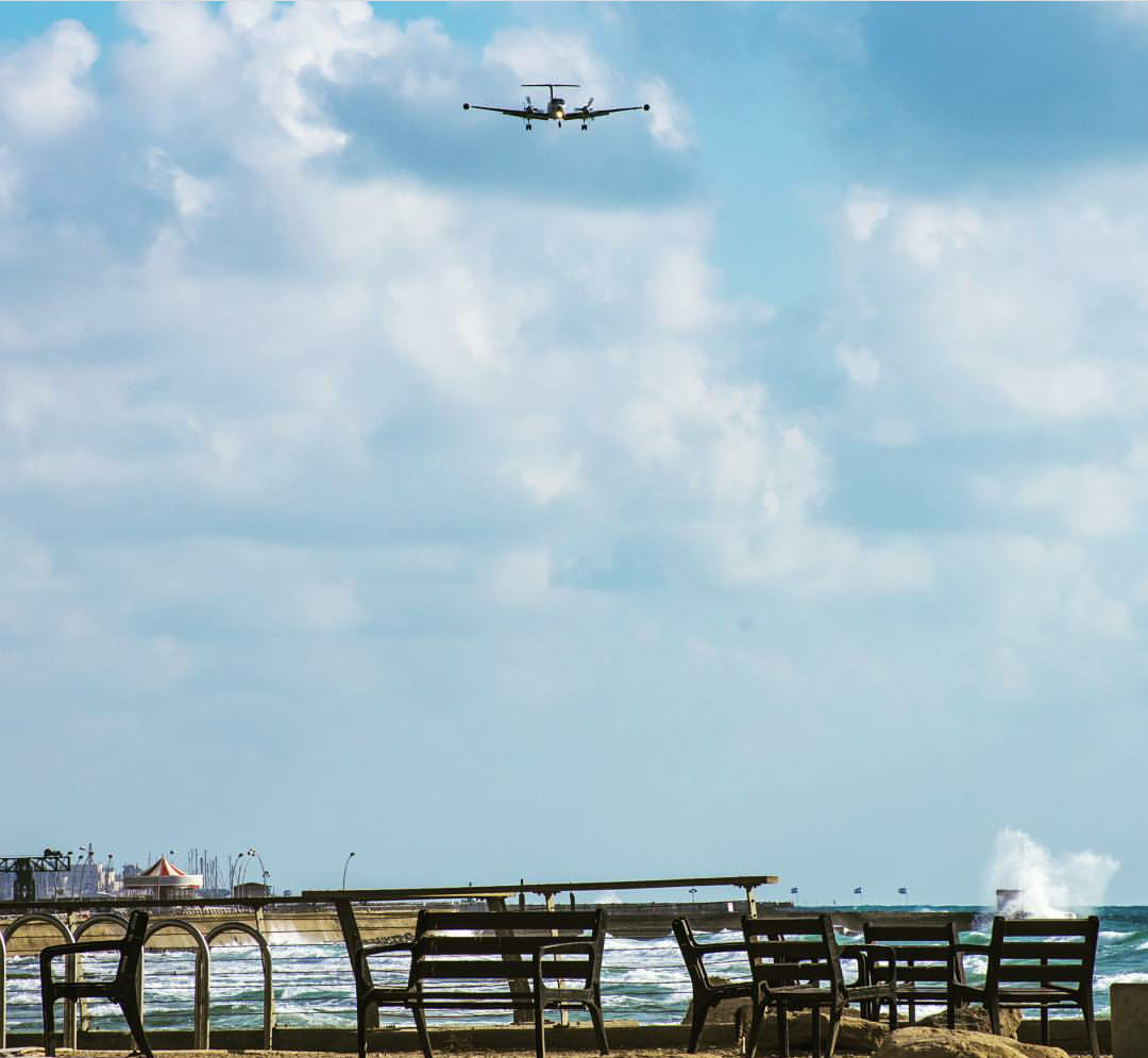 מטוס צבאי נוחת מכיוון נמל תל אביב